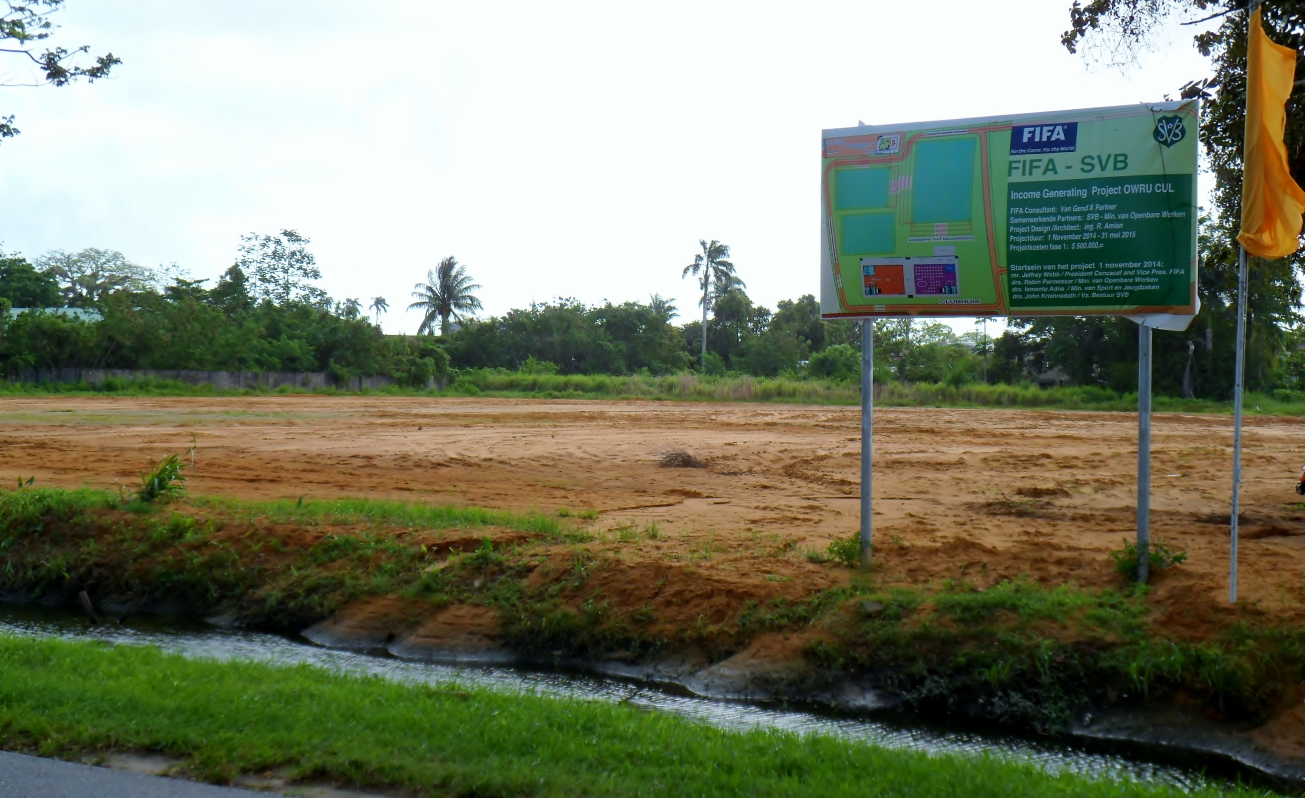 Neubau Sportkomplex des surinamischen Fußballbundes (SVB) in Paramaribo an der Letitia Vriesdelaan